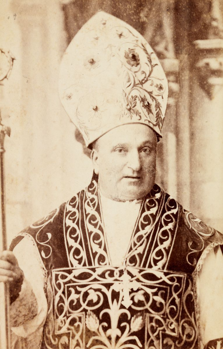 Portrait de l’évêque australien James Moore (1834-1904). Photographie de Thomas Foster Chuck (ca. 1888-89)